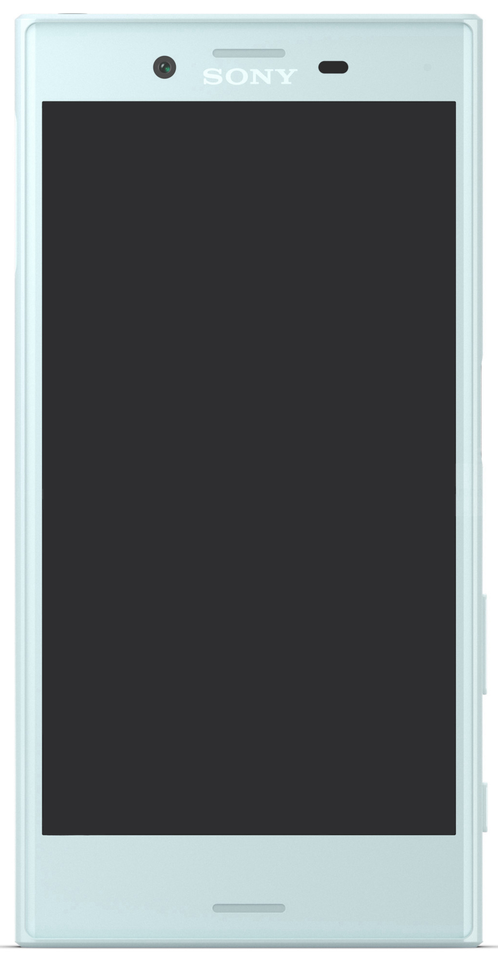 Sony Xperia X Compact 模型